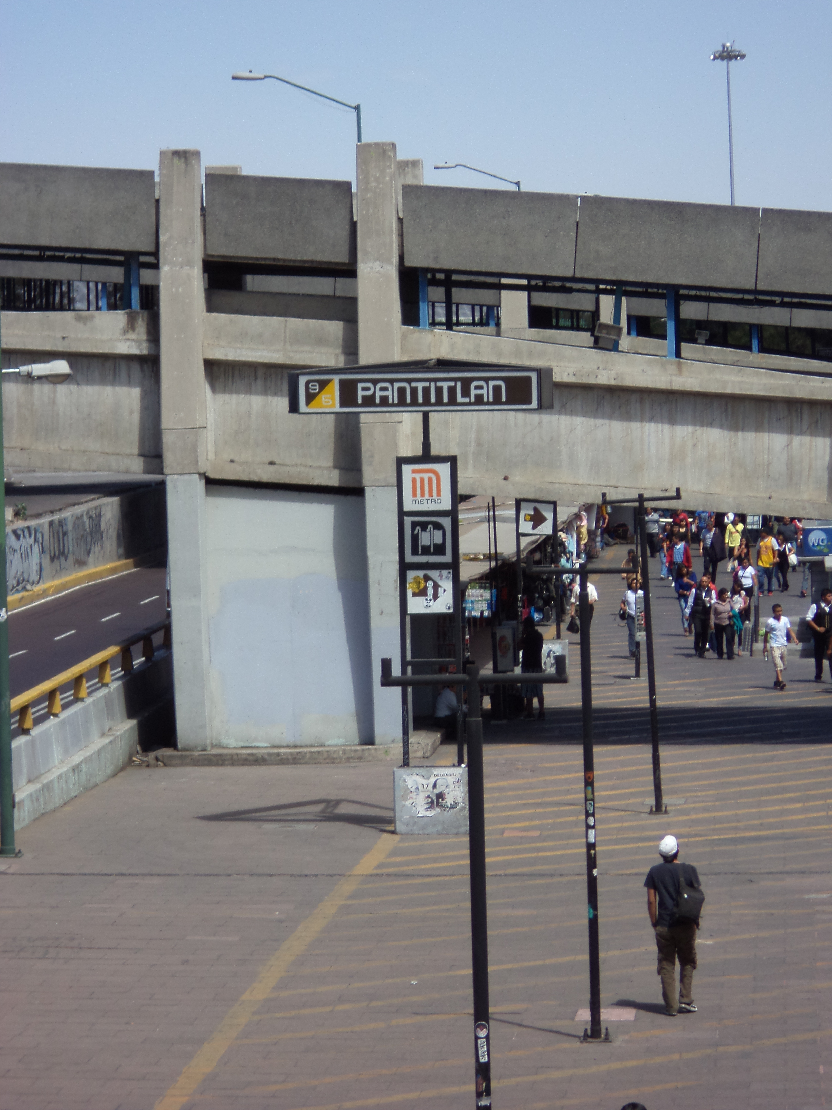 Letrero Estacion Pantitlan